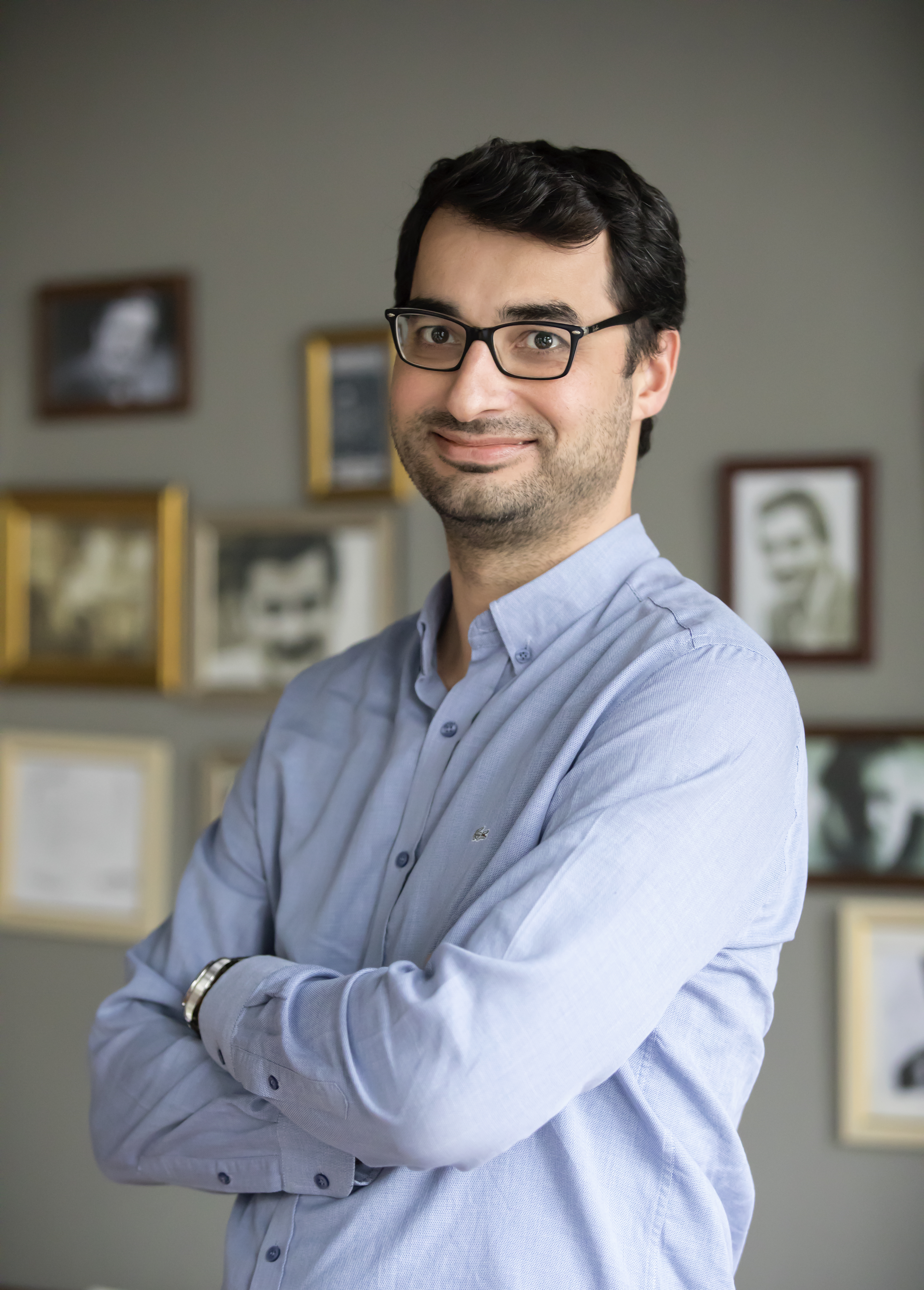 Doğum 13 Ekim 1980 (39 yaşında) İstanbul, Türkiye Eğitim İstanbul Teknik Üniversitesi Mühendislik Fakültesi Meslek Gazeteci